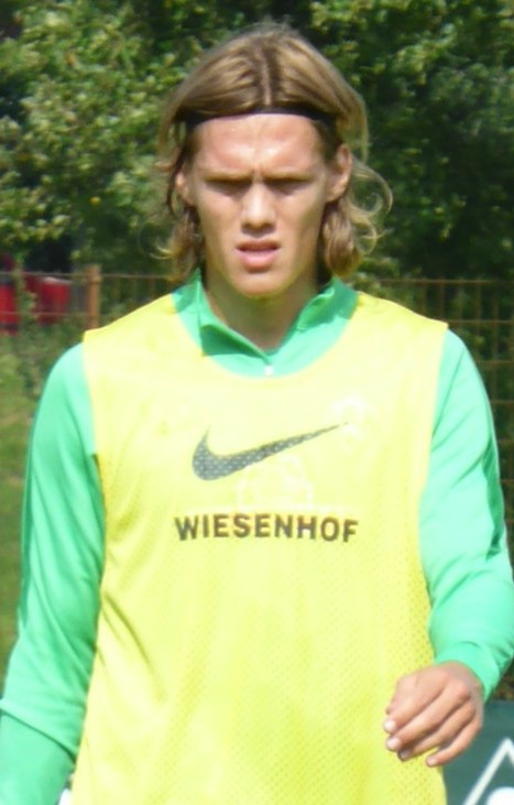 Jannik Vestergaard während eines Trainings in Bremen.